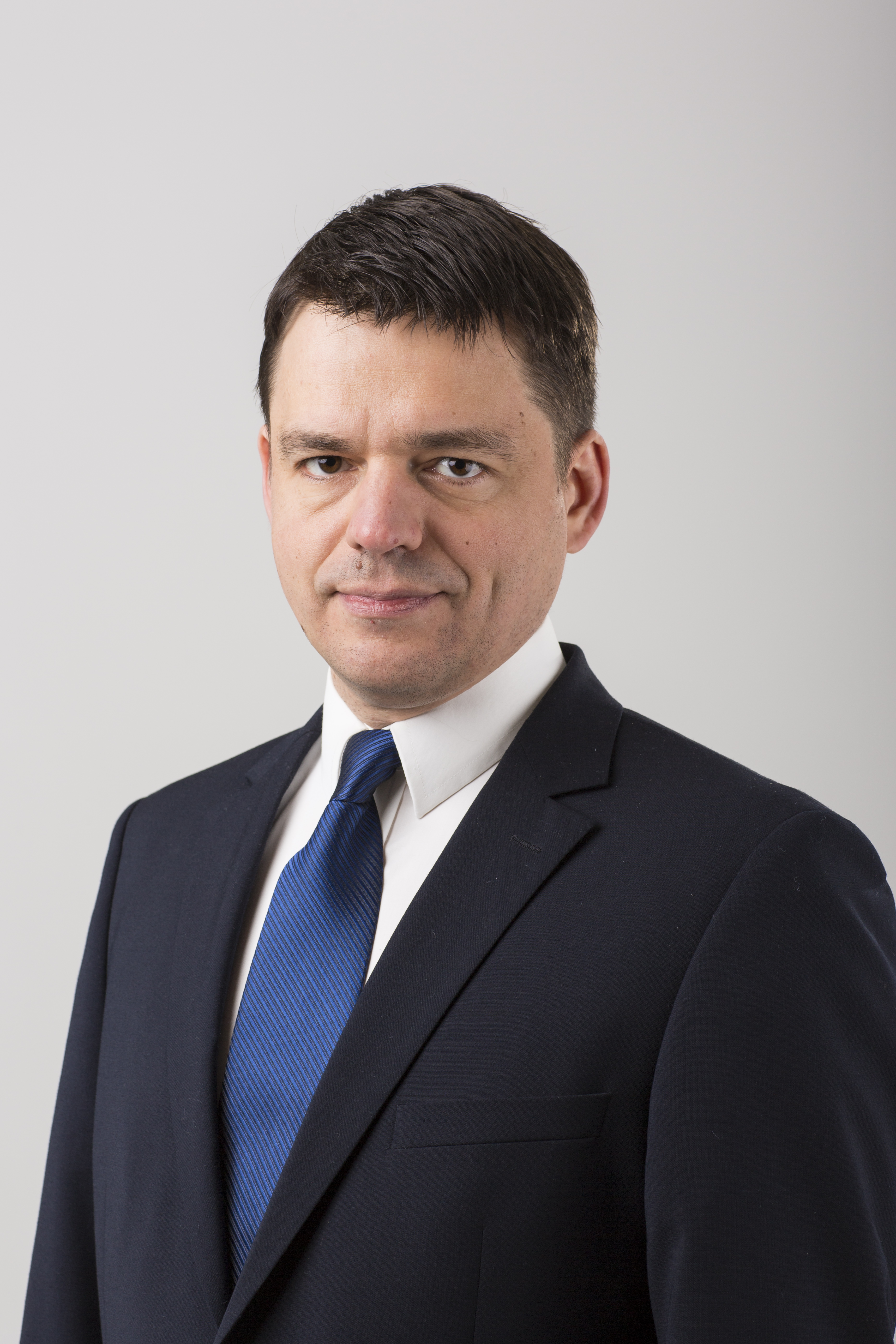 2014.gada 9.decembris. 12.Saeimas deputāts Edvīns Šnore. Foto: Reinis Inkēns, Saeimas Kanceleja Izmantošanas noteikumi: saeima.lv/lv/autortiesibas